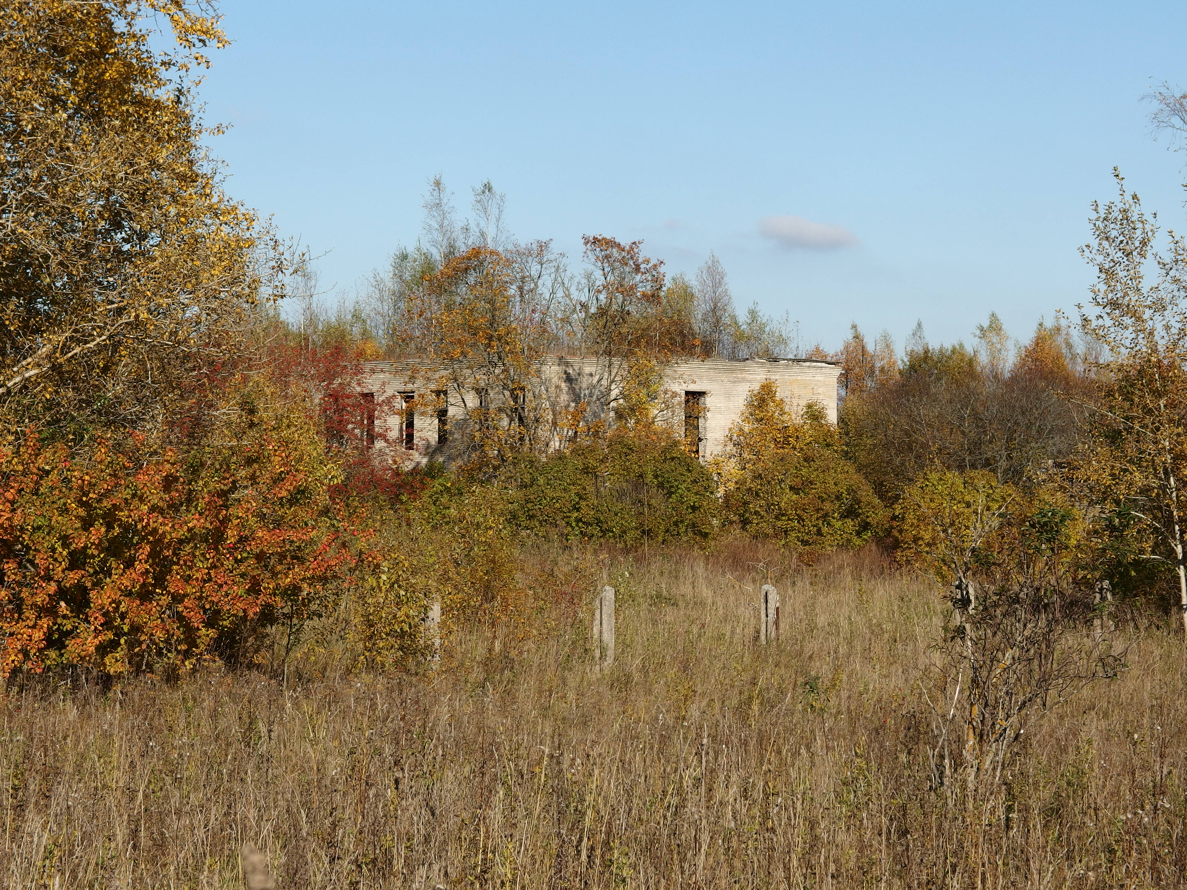 Endine sõjaväebaas Põimas